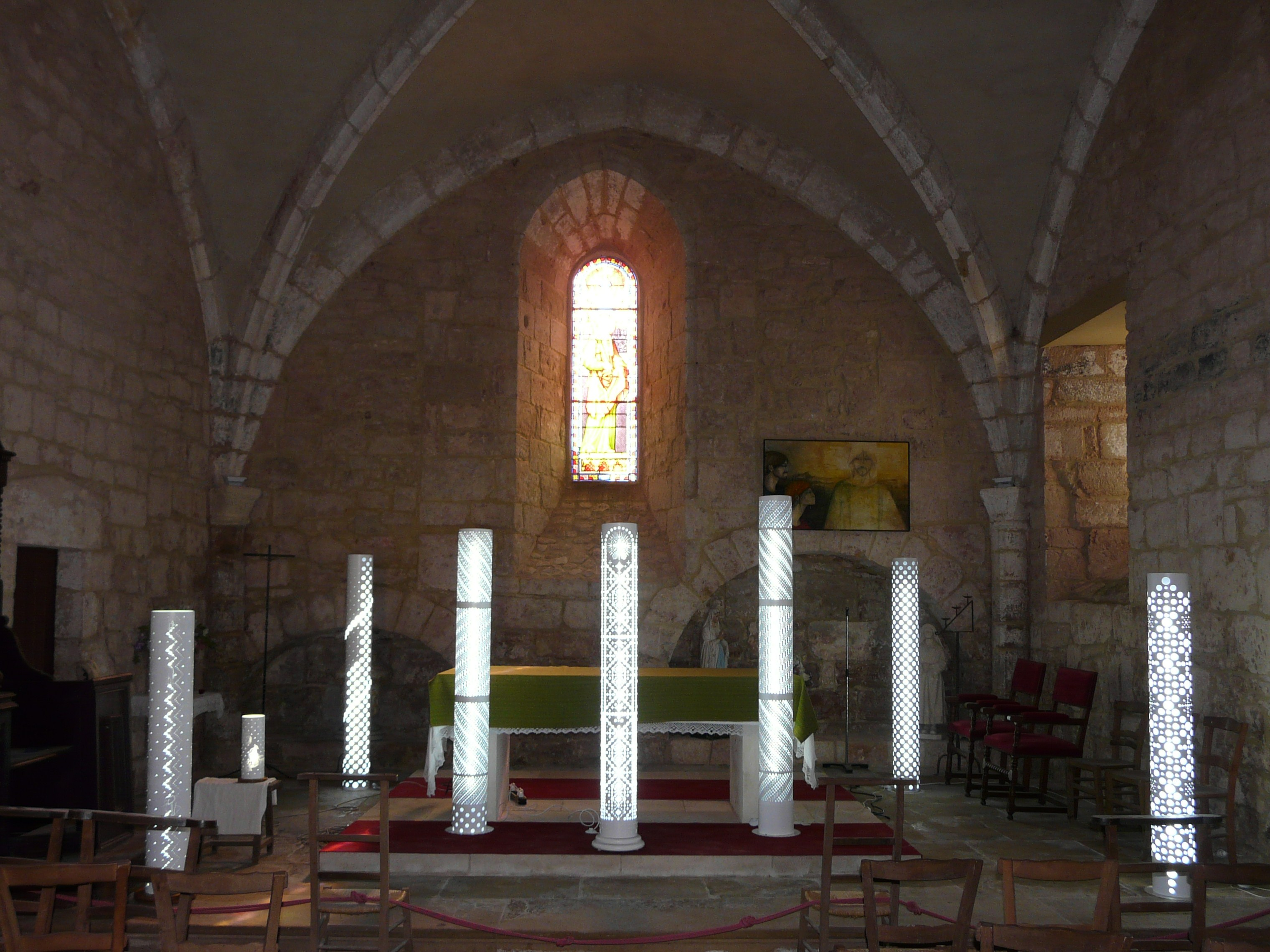 Le chœur de l'église, Nailhac, Dordogne, France.